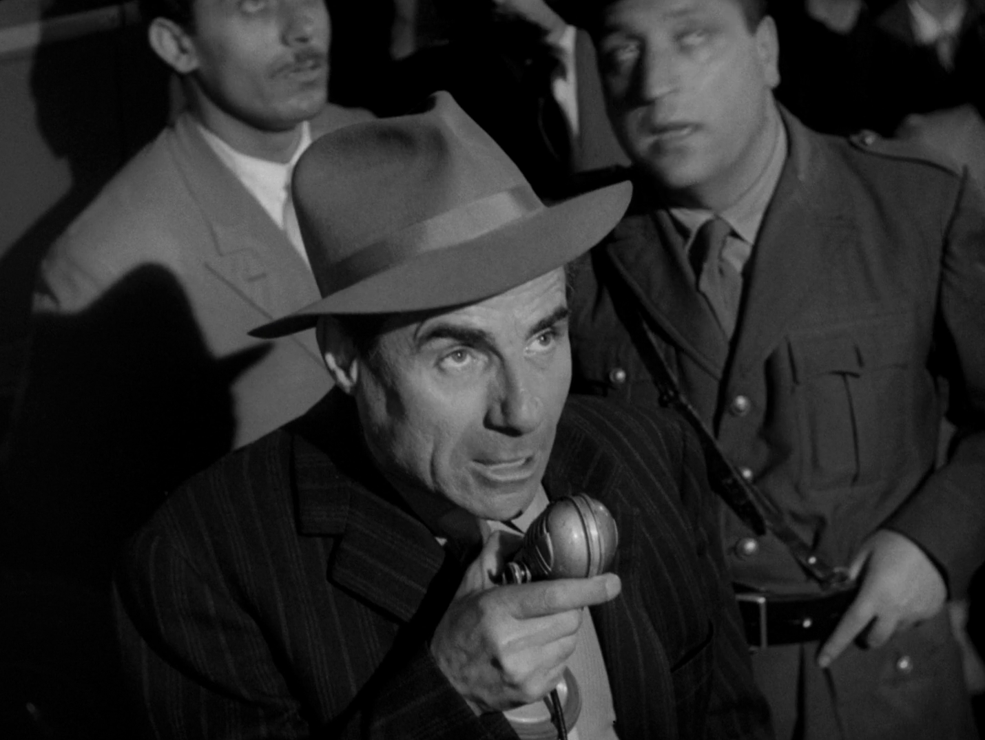 scena dal film Un americano a Roma